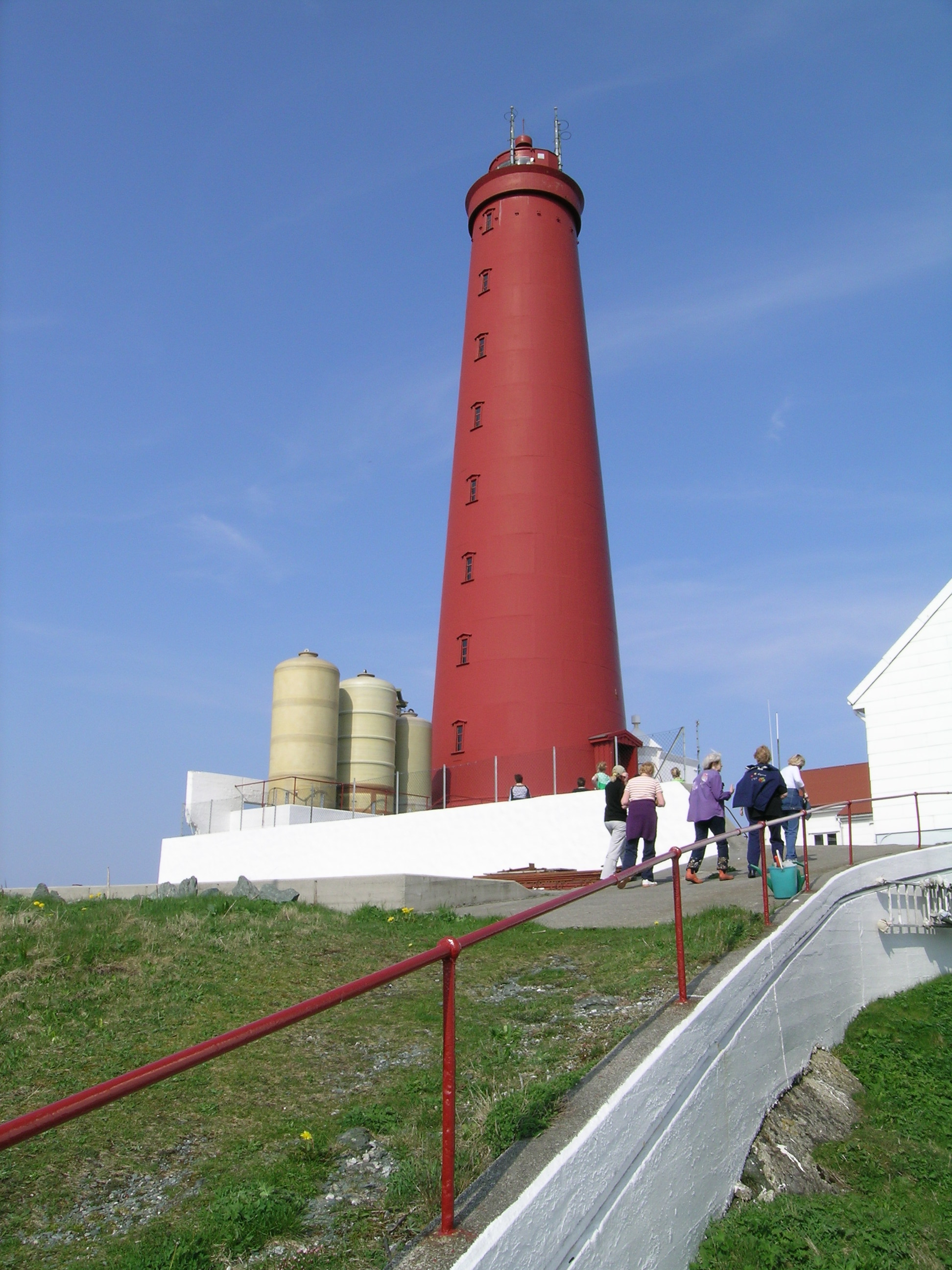 Utvær fyr eller Utvær fyrstasjon ligger i Solund kommune i Sogn og Fjordane. Utvær er det vestligste punktet i Norge, og ligger på øygruppa Utvær, et fredet naturreservat. Fyret har et rødt fyrtårn med lyskilde 45 m.o.h.